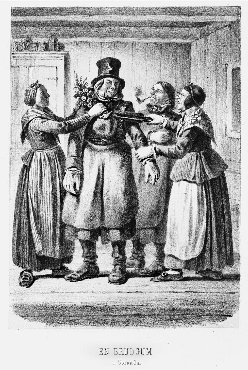 "En brudgum i Sorunda". Efter litografi av C A Dahlström, trol. 1850-tal. Interiör med en brudgum omgiven av två kvinnor och en piprökande man.